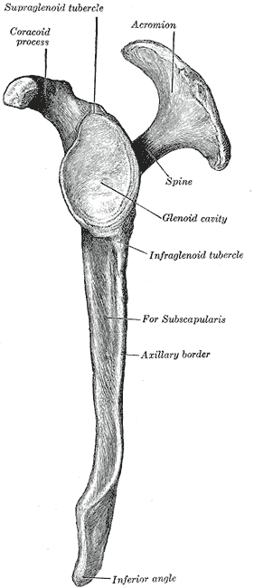 Left scapula. Lateral view.